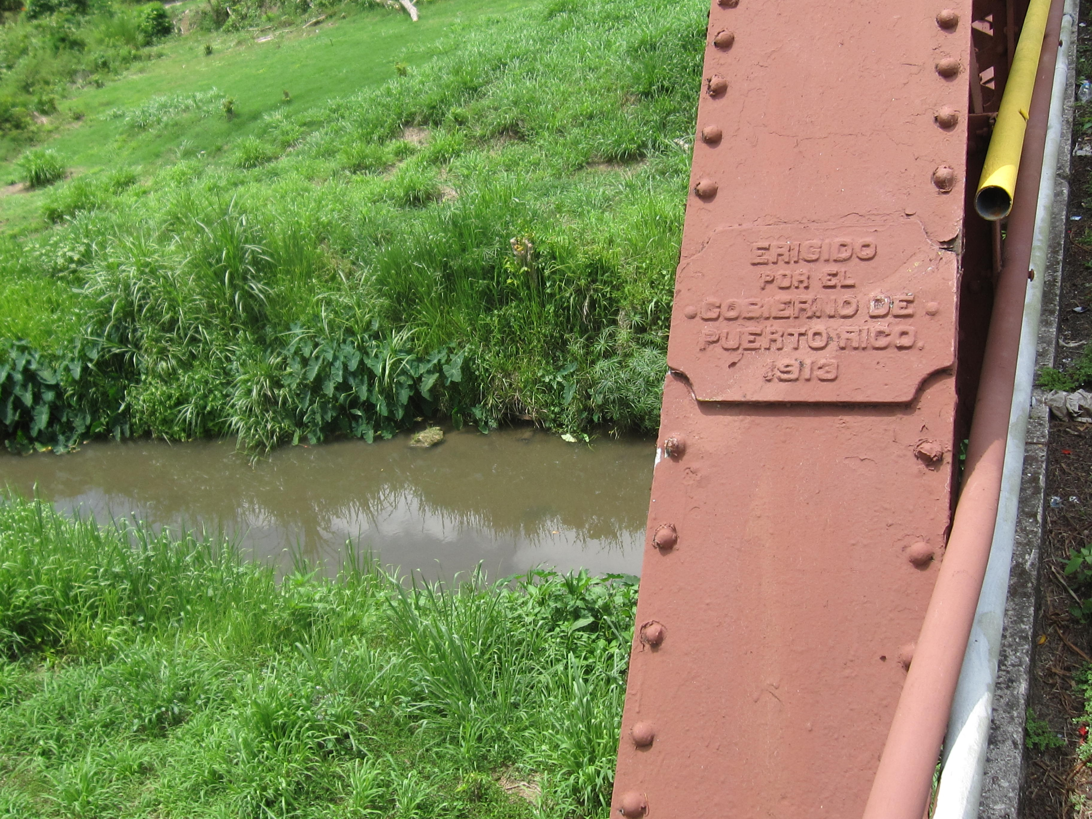 Río Indio desde el Puente Colorao, Morovis, Puerto Rico